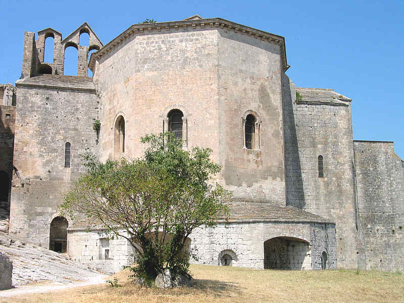 Arles (Bouches-du-Rhône_France), abbaye de Montmajour, chevet de l'abbatiale Notre-Dame